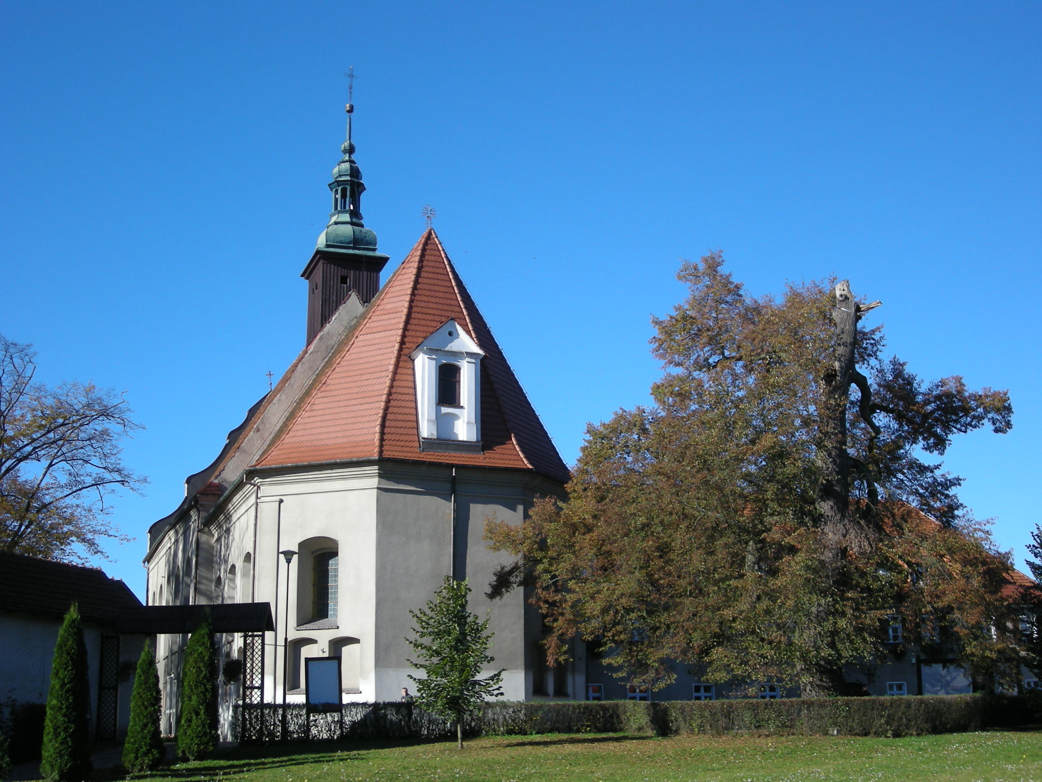 Klasztor w Górce Klasztornej - kościół p.w. NMP Niepokalanie Poczętej